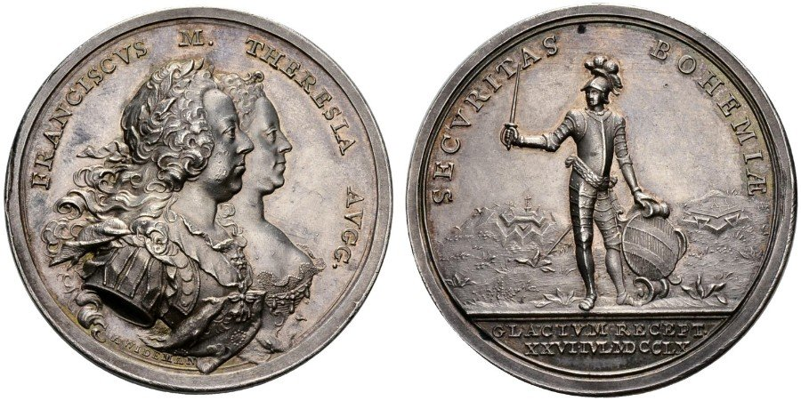 Denkmünze auf die Wiedereroberung der Festung Kłodzko/Glatz am 26. Juli 1760. Avers: Das Kaiserpaar Franz I. von Lothringen und Maria Theresia von Österreich. Revers: SECVRITAS BOHEMIAE (die Sicherheit Böhmens), geharnischter Krieger mit Wappenschild von Kłodzko/Glatz.